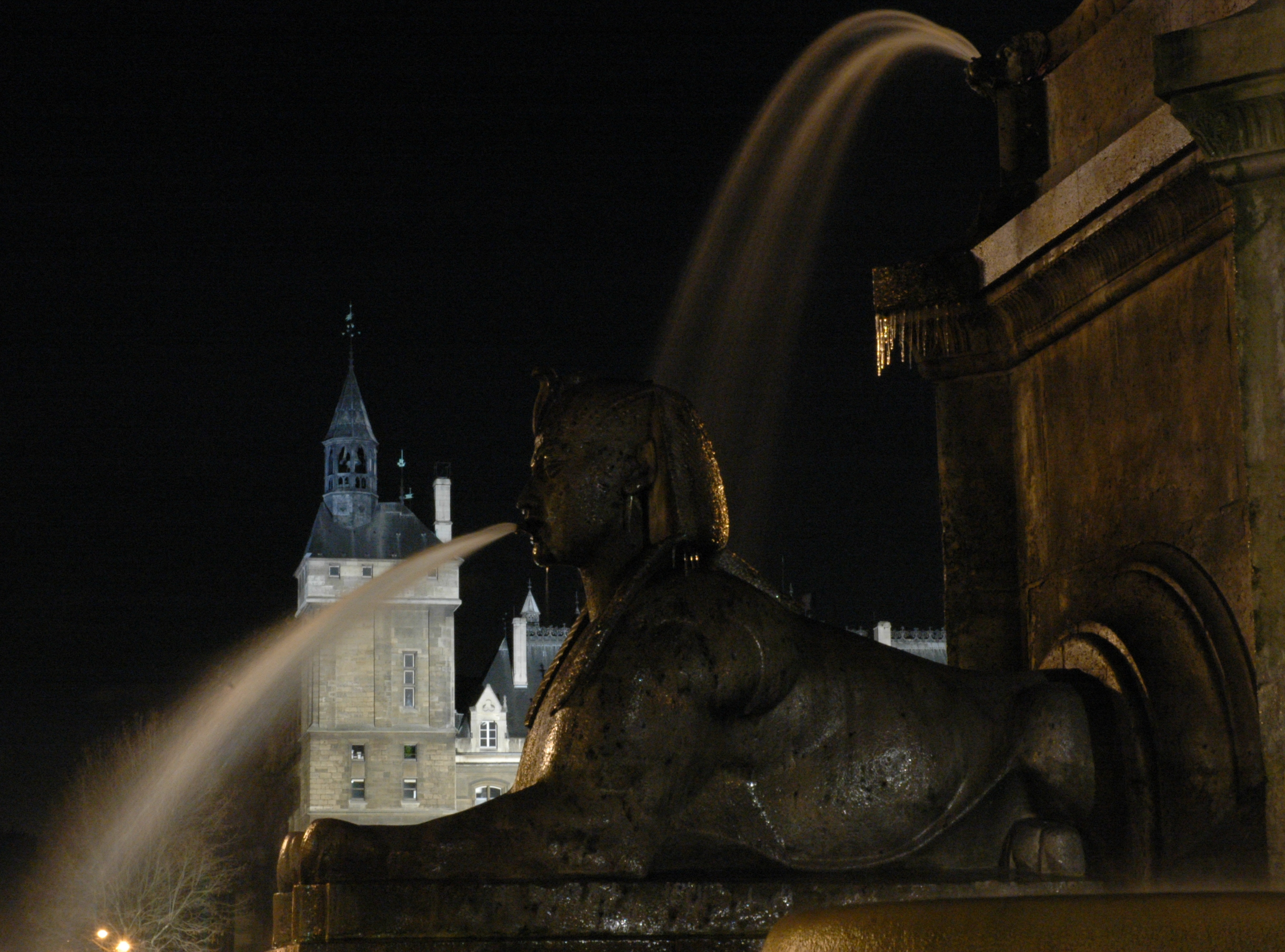 La Fontaine du Palmier, Place du Châtelet à Paris, avec au fond la Tour de l'Horloge du Palais de la Cité.